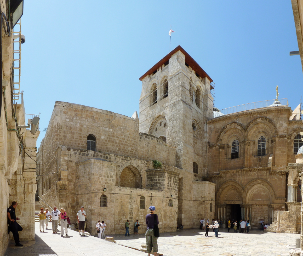 Panorama 4